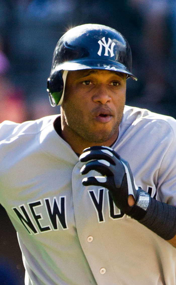 Robinson Canó